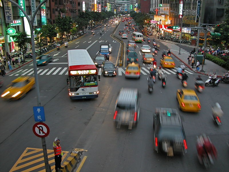 Typisch straatbeeld Taipei.